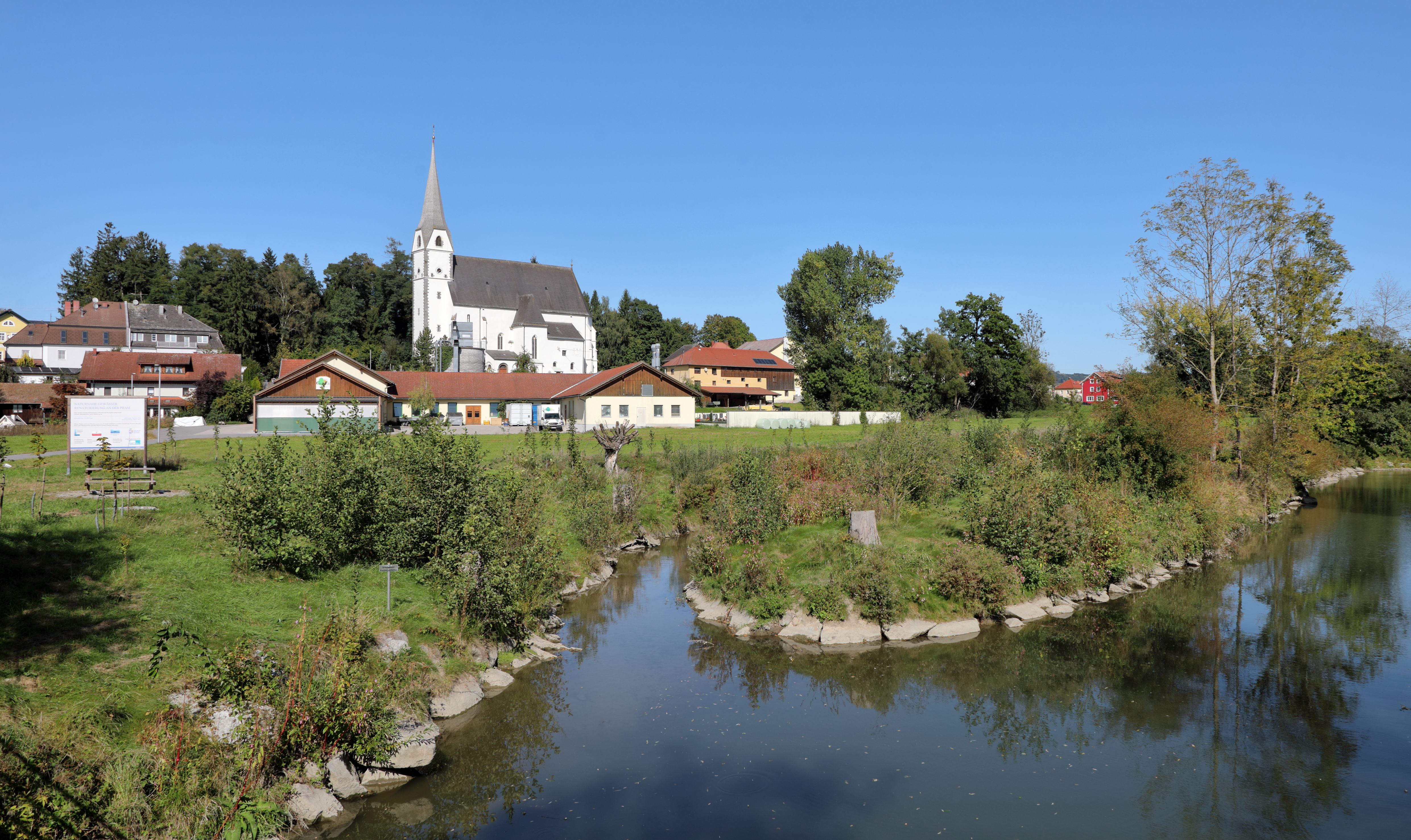 Teil der oberösterreichischen Marktgemeinde Taufkirchen an der Pram mit der Pram im Vordergrund und der röm.-kath. Pfarrkirche Mariä Verkündigung im Hintergrund. Die Pram wurde an dieser Stelle mit einen Nebenarm 2016/17 um 250.000,- Euro renaturiert.